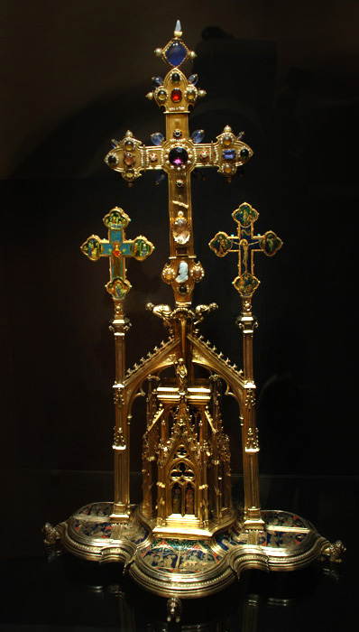 relicario lignun crucis pamplona